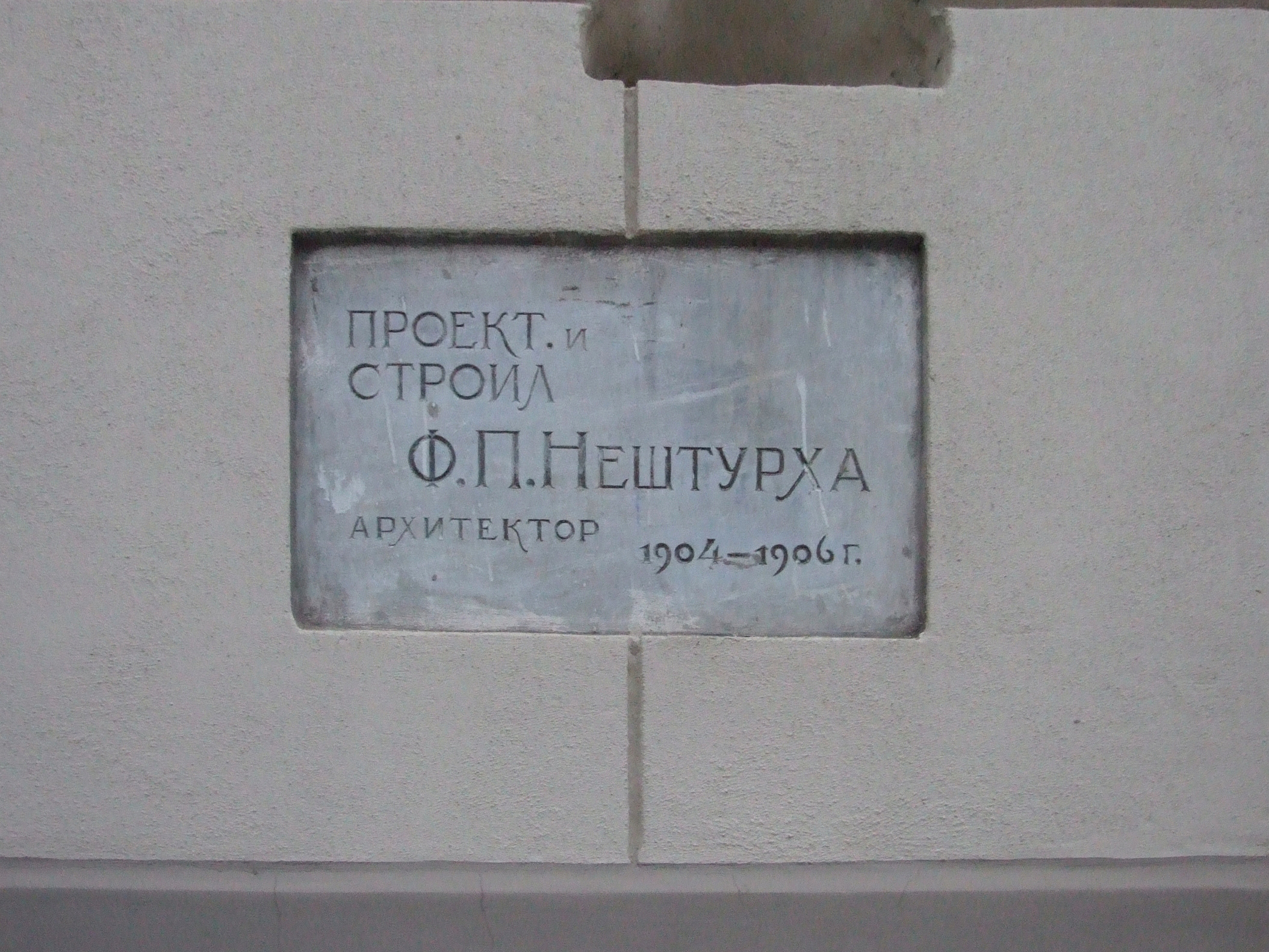 Одеська національна наукова бібліотека ім. М.Г. Горького (первісно Одеська міська імені імператора Миколи ІІ-го публічна бібліотека), архітектор Федір Павлович Нестурх, проект 1904 р.; Будівництво 1905-1906 рр.; Відкриття, 1907 р.